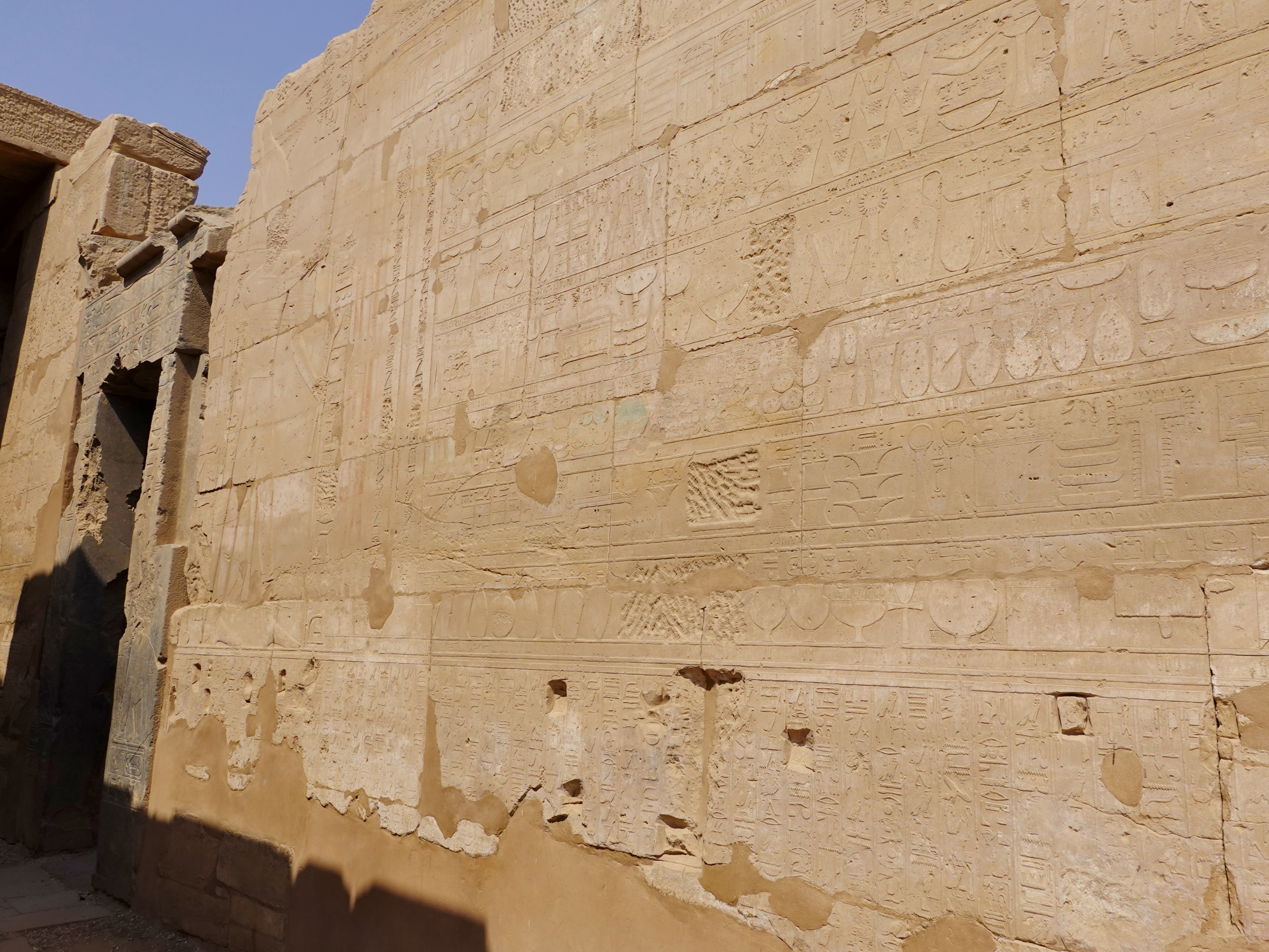 Palast der Maat im Tempel von Karnak, Luxor, Ägypten